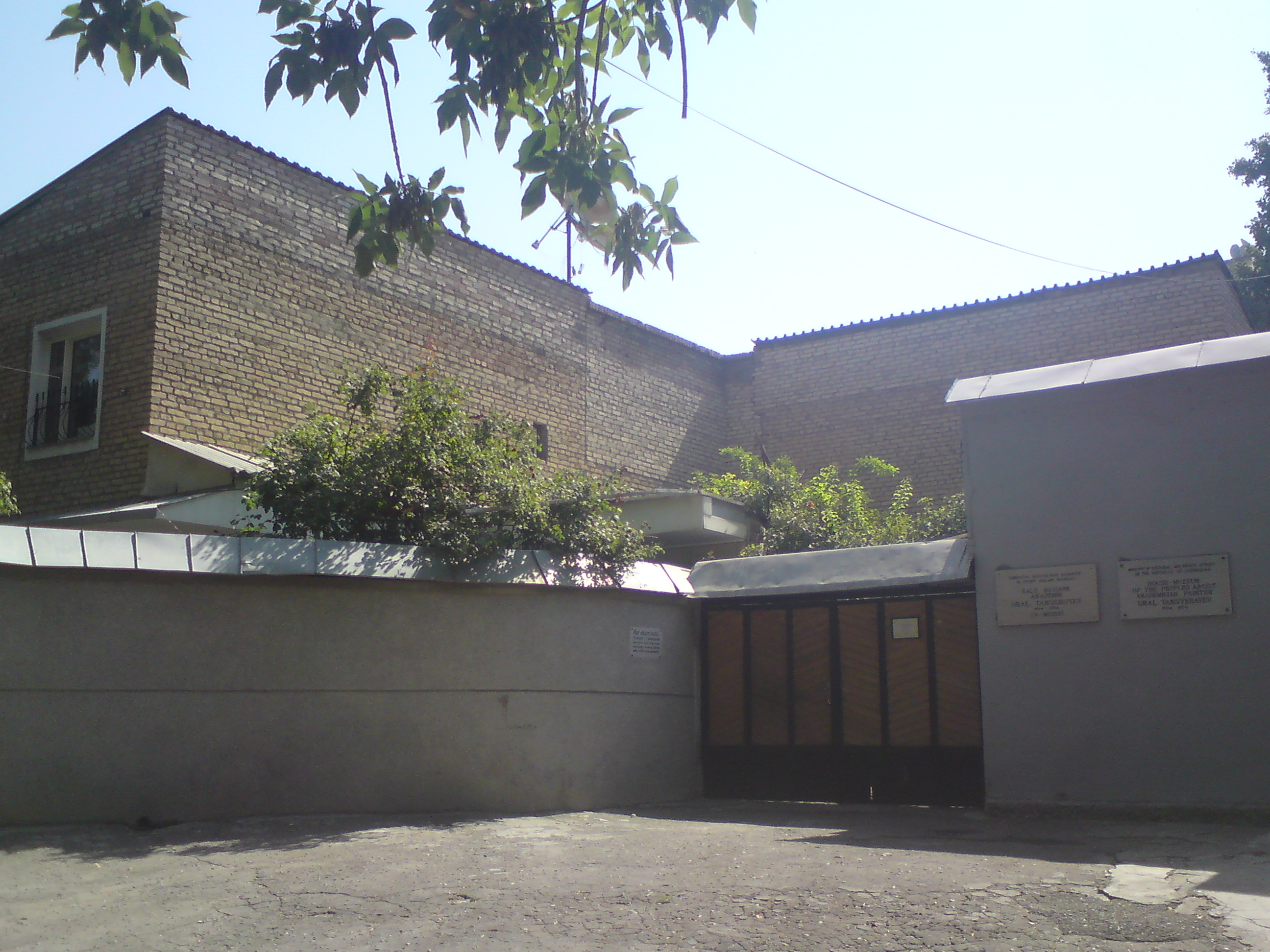 Мемориальный дом-музей народного художника, академика Урала Тансыкбаева, город Ташкент, Мирзо-Улугбекский район, массив Буз-1, дом 5